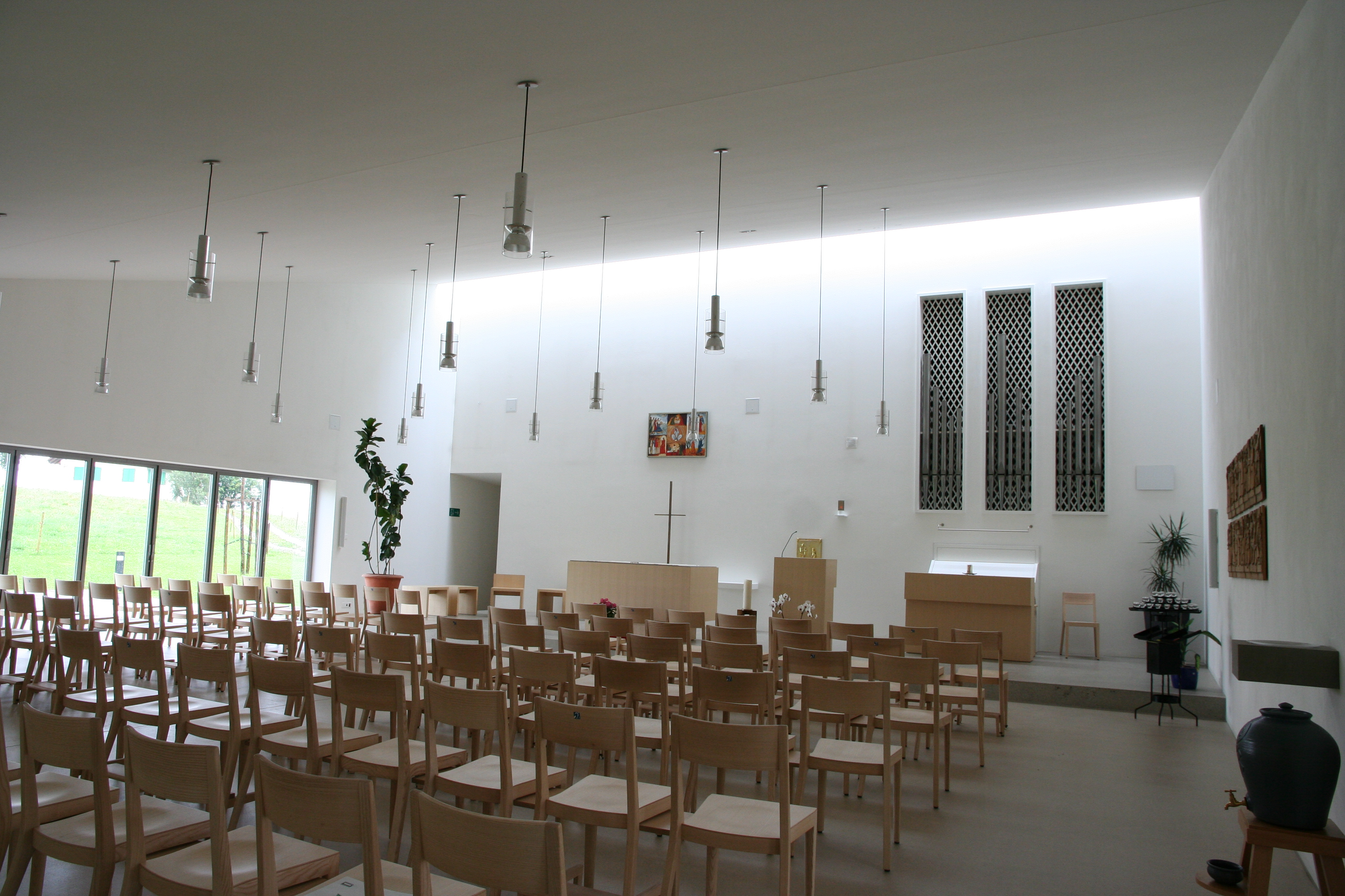 Römisch-katholische Kirche St. Marien Richterswil-Samstagern, Innenansicht